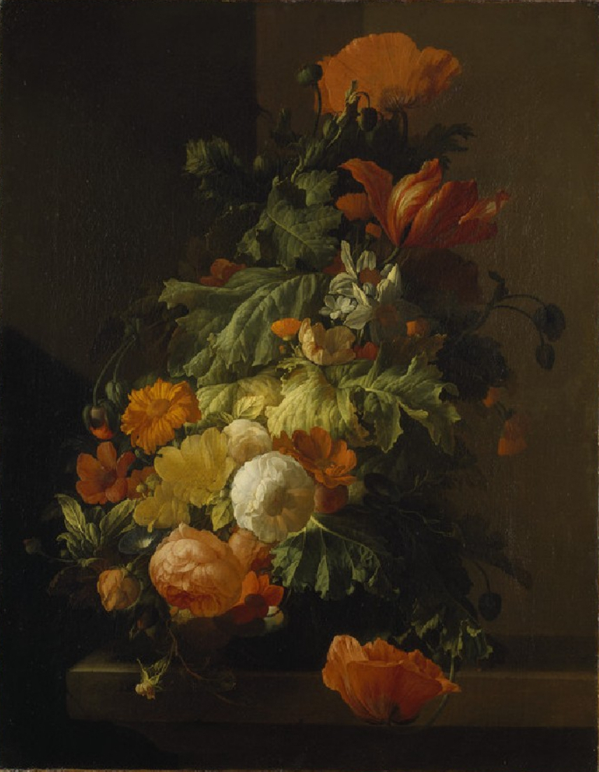 A vase of flowers on a stone slab.label QS:Len,"A vase of flowers on a stone slab." label QS:Lnl,"Bloemen in een vaas op een stenen tafelblad."